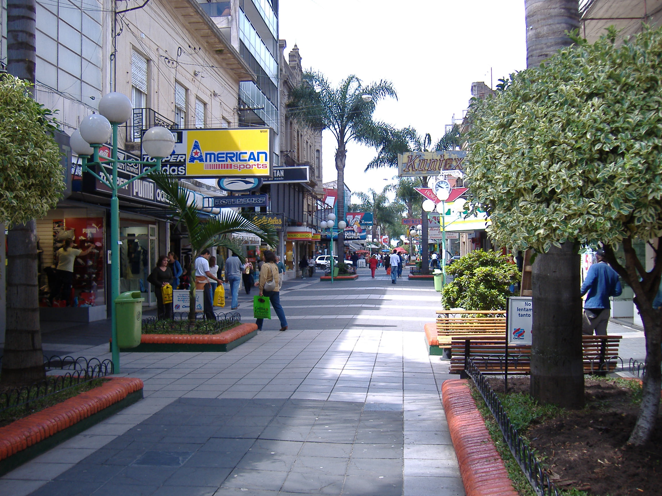 Peatonal Entre Ríos, a 3-block pedestrian segment of Entre Ríos St. in downtown Concordia, Entre Ríos Province, Argentina.